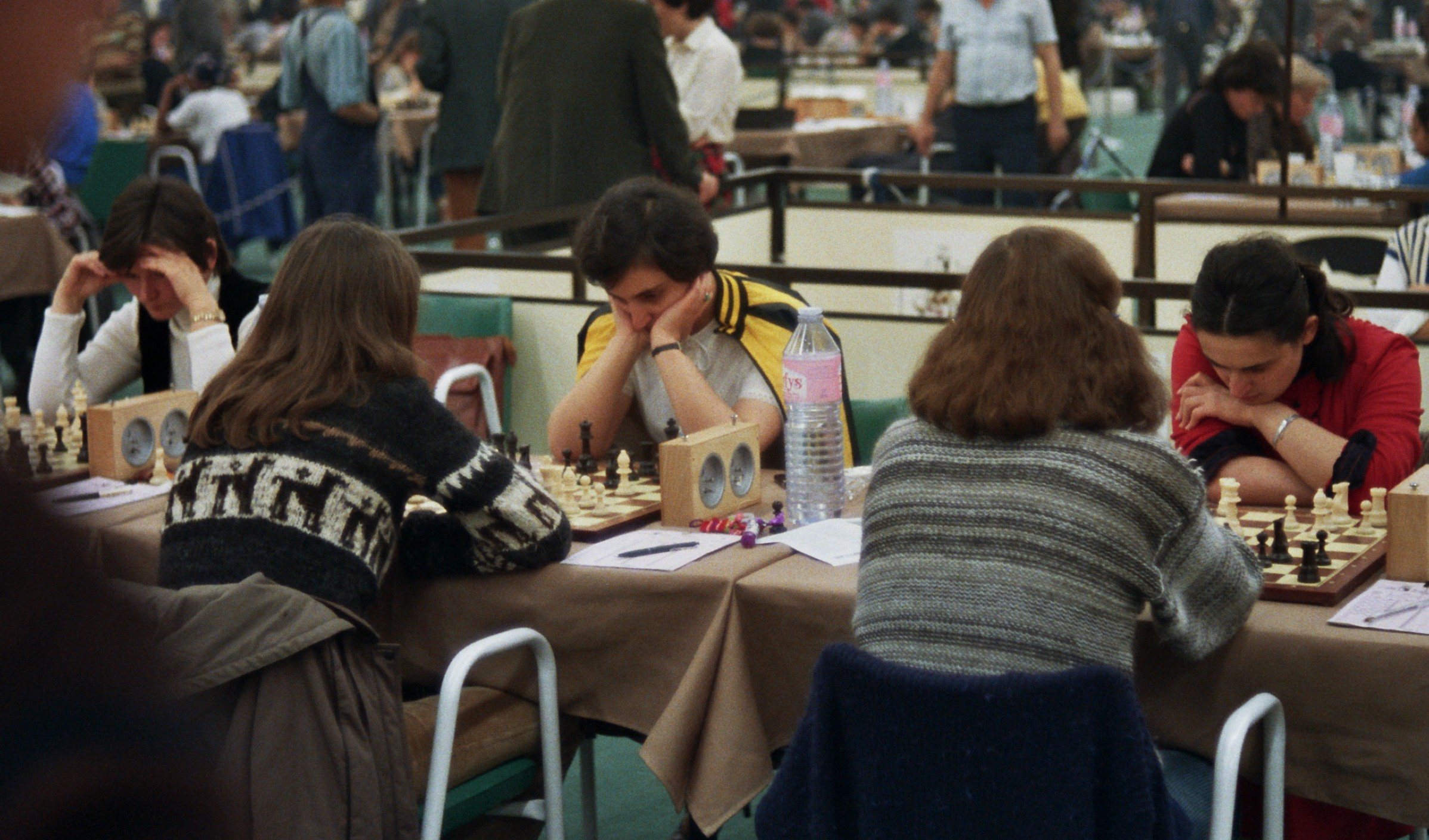 Schacholympiade 1984 in Thessaloniki, 8. Runde. Von rechts nach links die Partien: Maia Chiburdanidze - Barbara Hund (remis), Gisela Fischdick - Irina Levitina (1-0) und Lidia Semenova - Stepanka Vokralova (1-0).